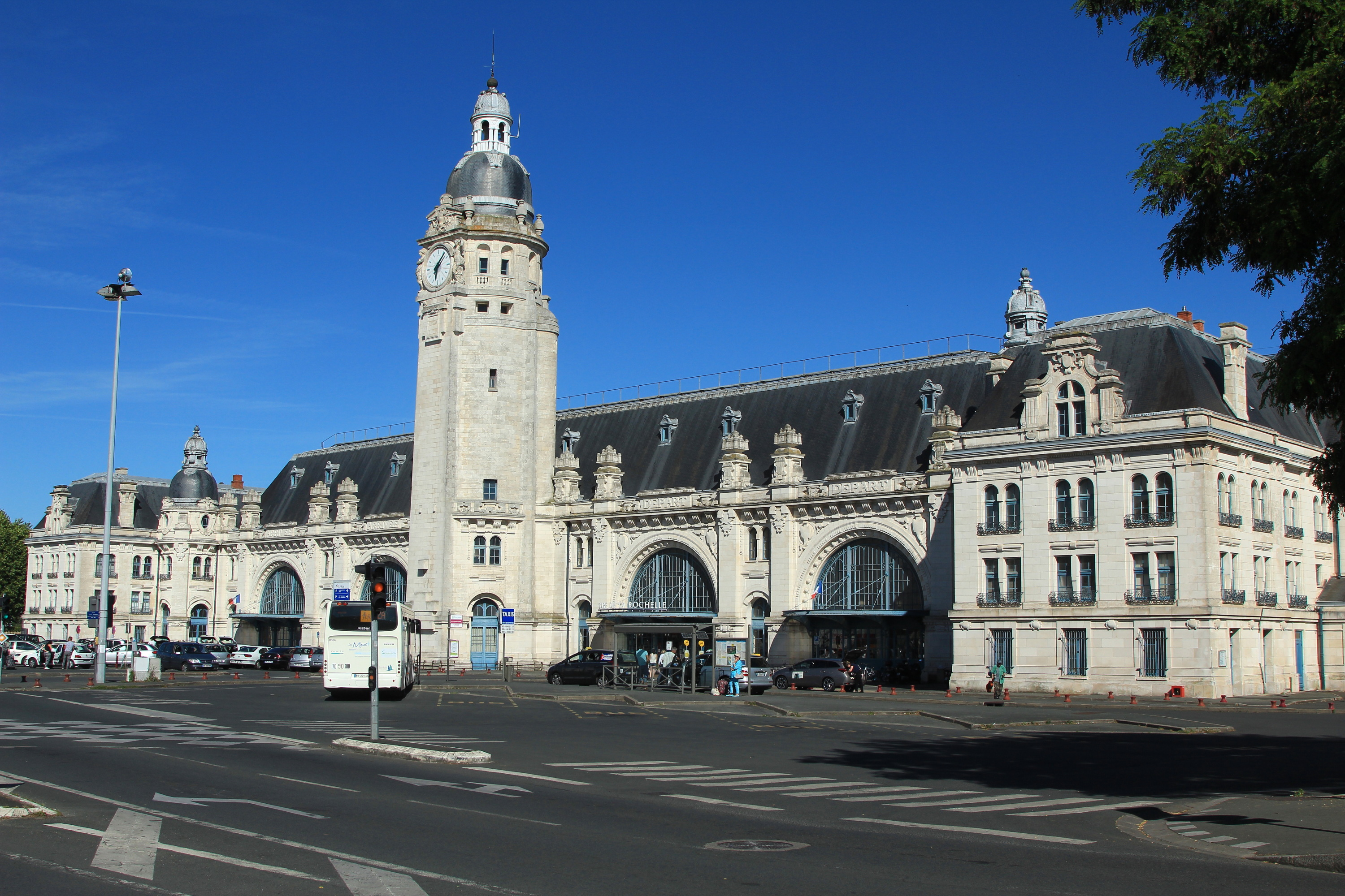 La bâtiment-voyageurs de la gare de La Rochelle-Ville, vu côté parvis.